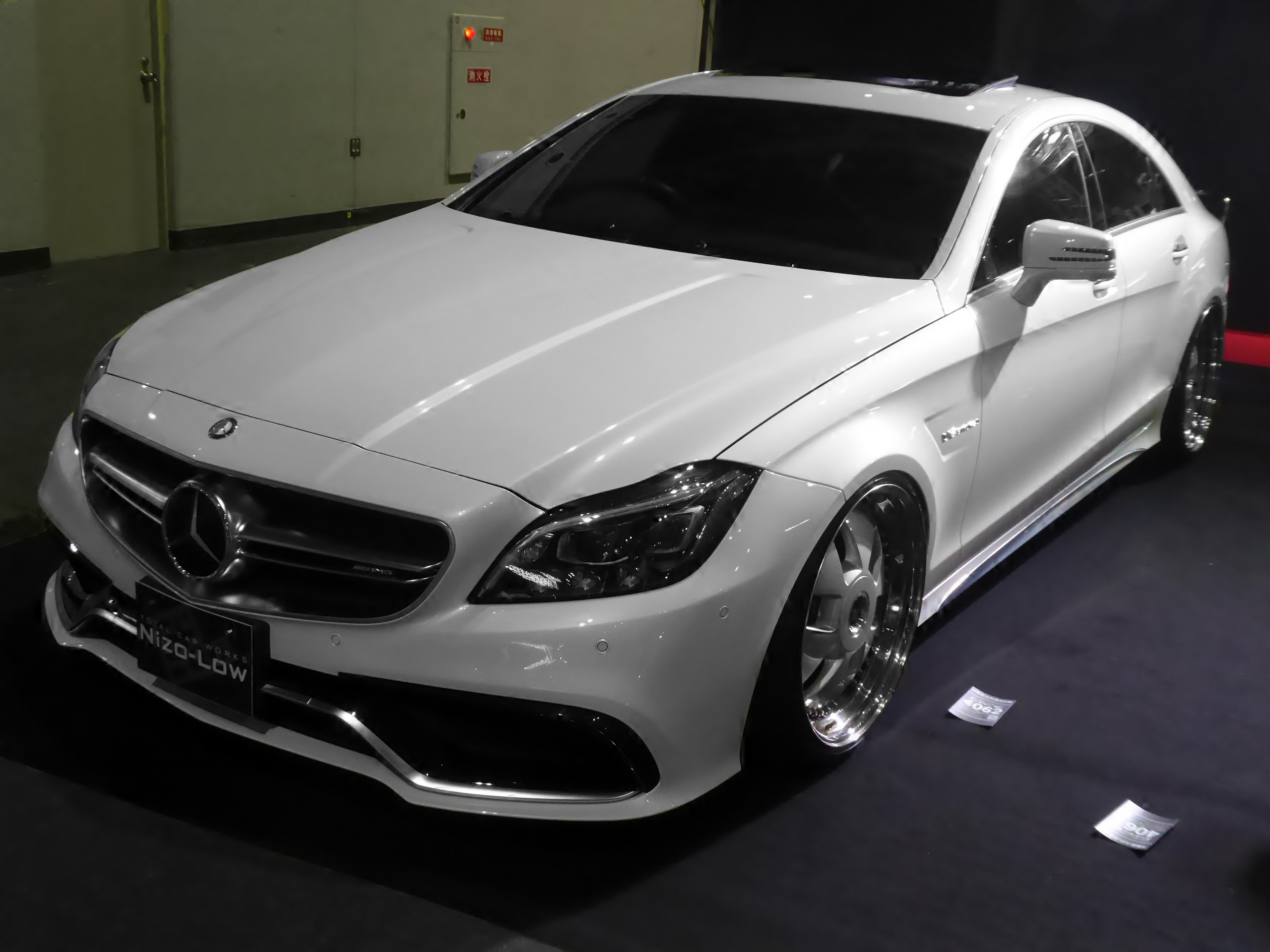 大阪オートメッセ2018に於いてNIZO-LOWの手掛けたC218系メルセデス・ベンツ・CLS63 AMGクーペを撮影。